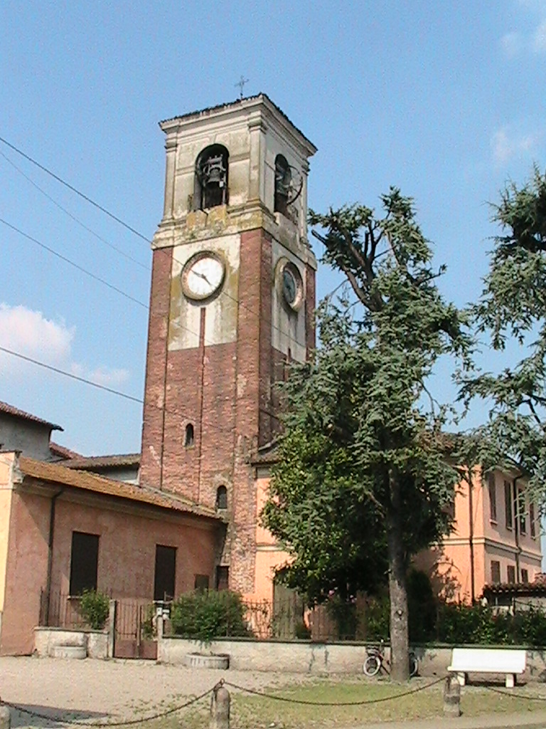 Pieve Terzagni (Pescarolo ed Uniti) - Chiesa di San Giovanni Decollato